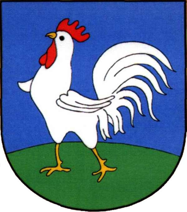 Herb wsi i gminy Kurzętnik.